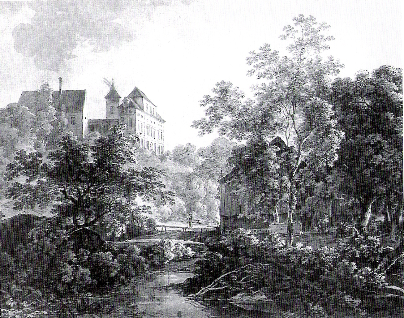 Harlaching Castle.de: Hinter dem Seitenflügel des 1796 abgebrannten Schlosses Harlaching ist die Turmspitze der Wallfahrtskirche St. Anna zu sehen.